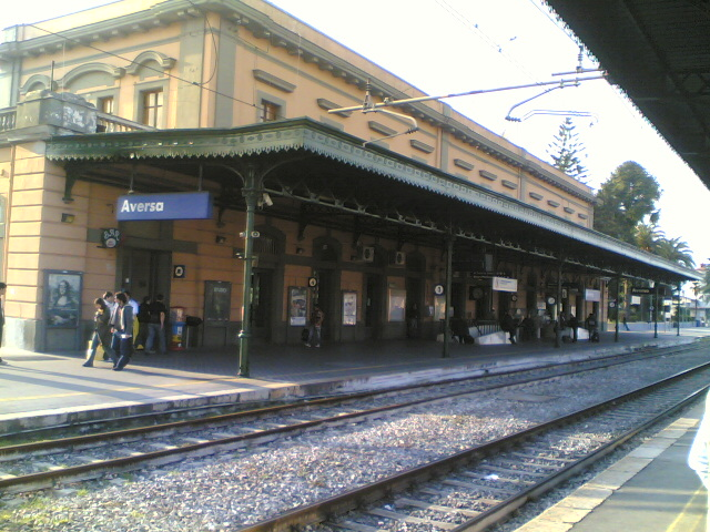 foto scattata da me medesimo con l'ausilio del mio telefono cellulare il giorno 18/03/2007